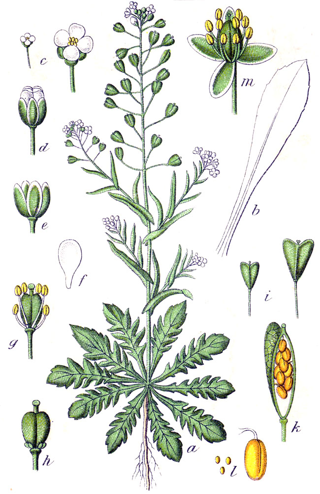 Capsella bursa-pastoris subsp. bursa-pastoris, syn. Crucifera capsella E.H.L.Krause Original Description "Hirtentschel", Crucifera capsella